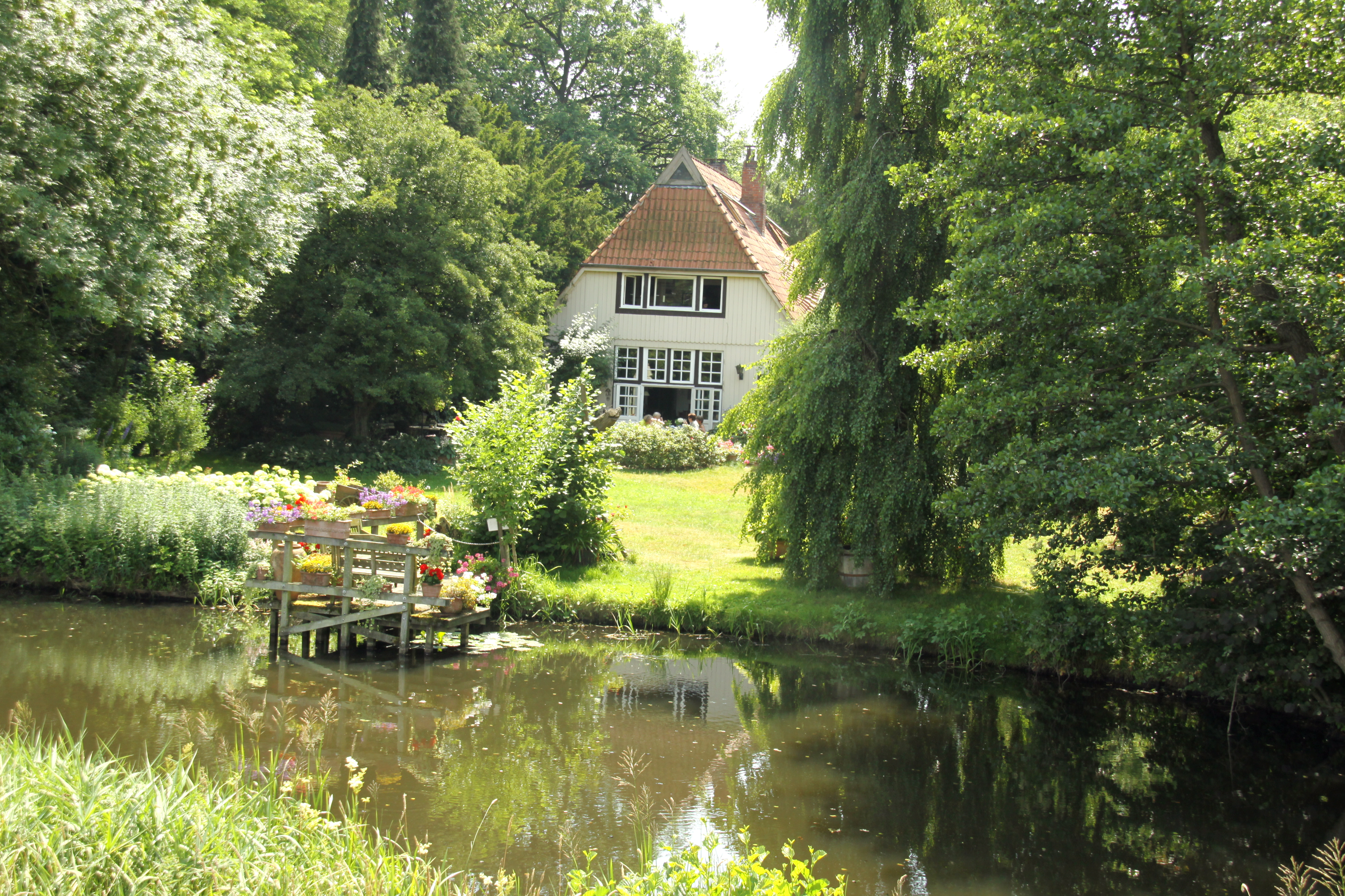 Fischerhude Rilke House